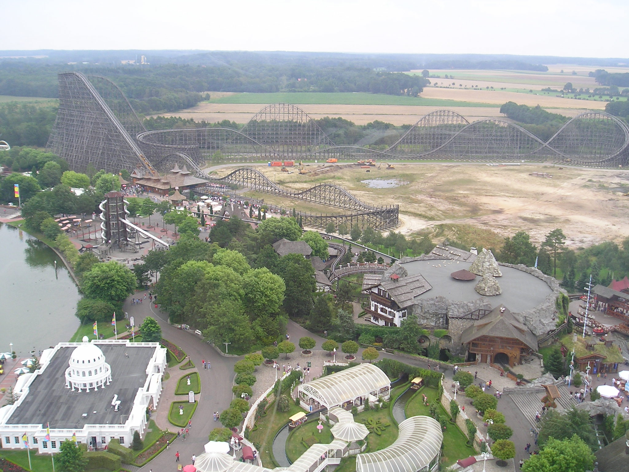 Colossos, fotografiert vom Aussichtsturm.